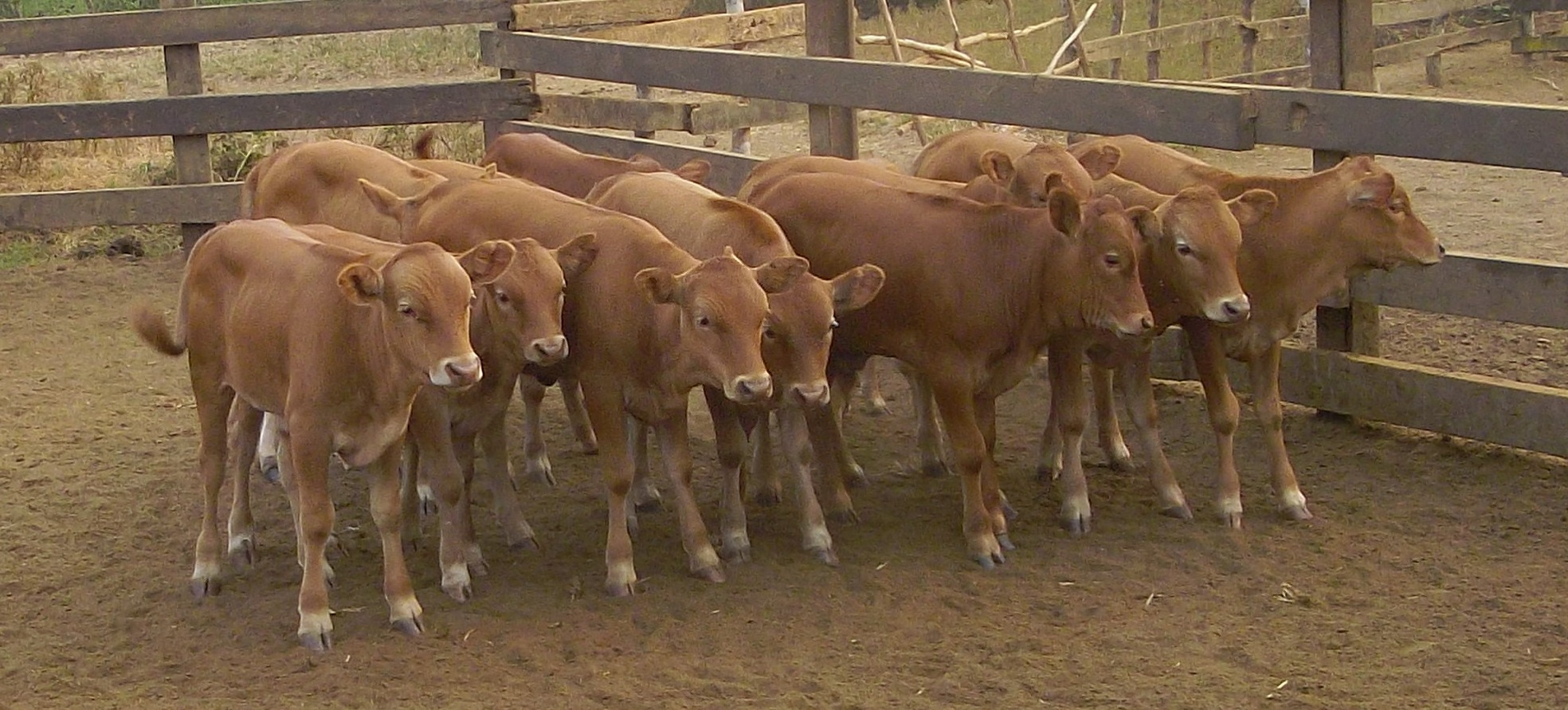 Sevrons